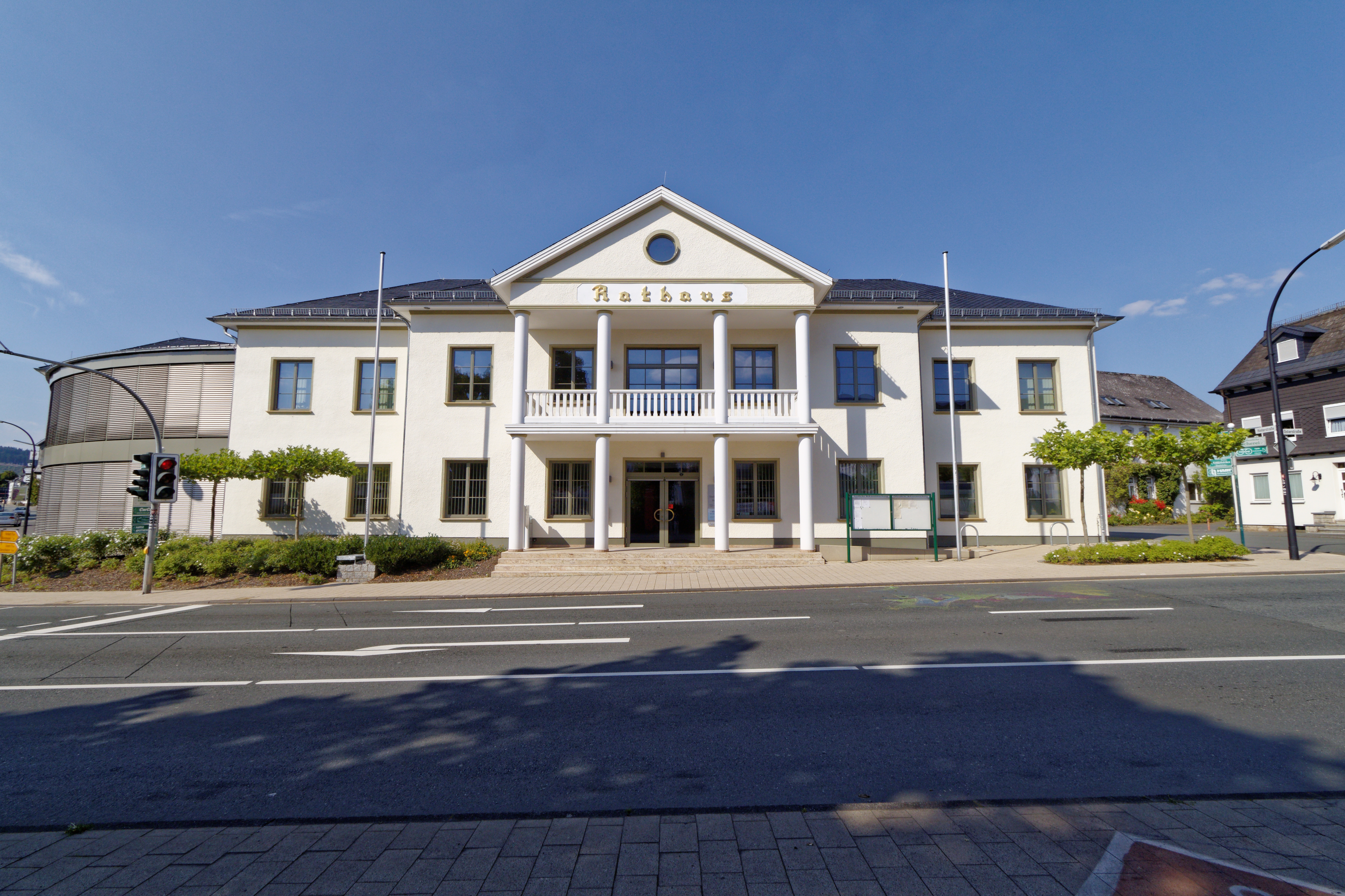 Medebach Rathaus